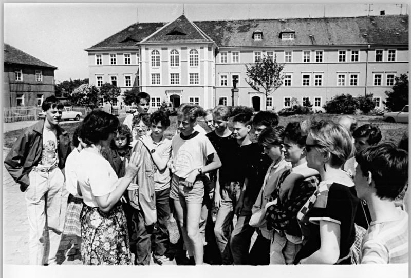 ADN-ZB-Häßler 29.5.89-Dresden: Museum Anläßlich des VII. Festivals sorbischer Kultur wird Anfang Juni das Sorbische Museum in Bautzen wiedereröffnet. Das Museum - Blick auf das 1782 errichtete Gebäude - verfügt über etwa 10.000 Exponate und eine Schatzkammer, die die museale Präsentation der nationalen Entwicklung der Sorben in lebendiger Weise ermöglicht.